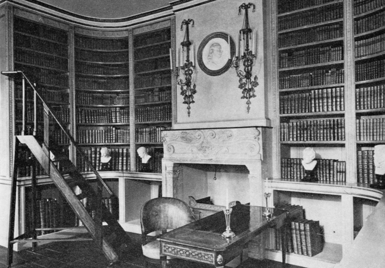 Gustav III:s paviljong, kungens bibliotek på 1960-talet